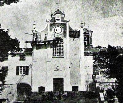 Foto dell'Ottocento raffigurante la vecchia facciata del santuario di Nostra Signora di Montallegro, Rapallo, Liguria, Italia